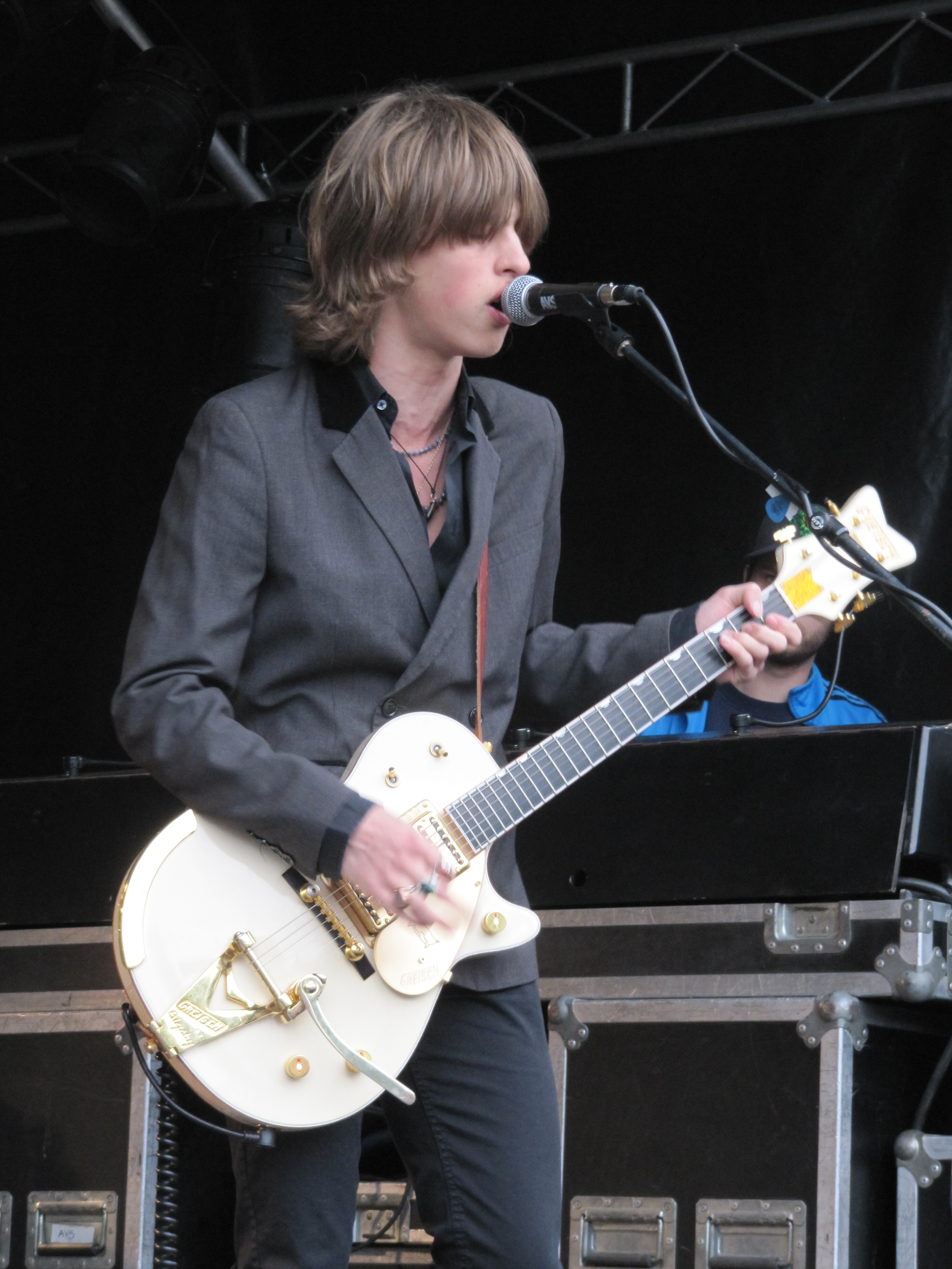 Pablo van de Poel, singer/guitar player of DeWolff, performing live at Op de Tôffel festival in Vierlingsbeek (NL)